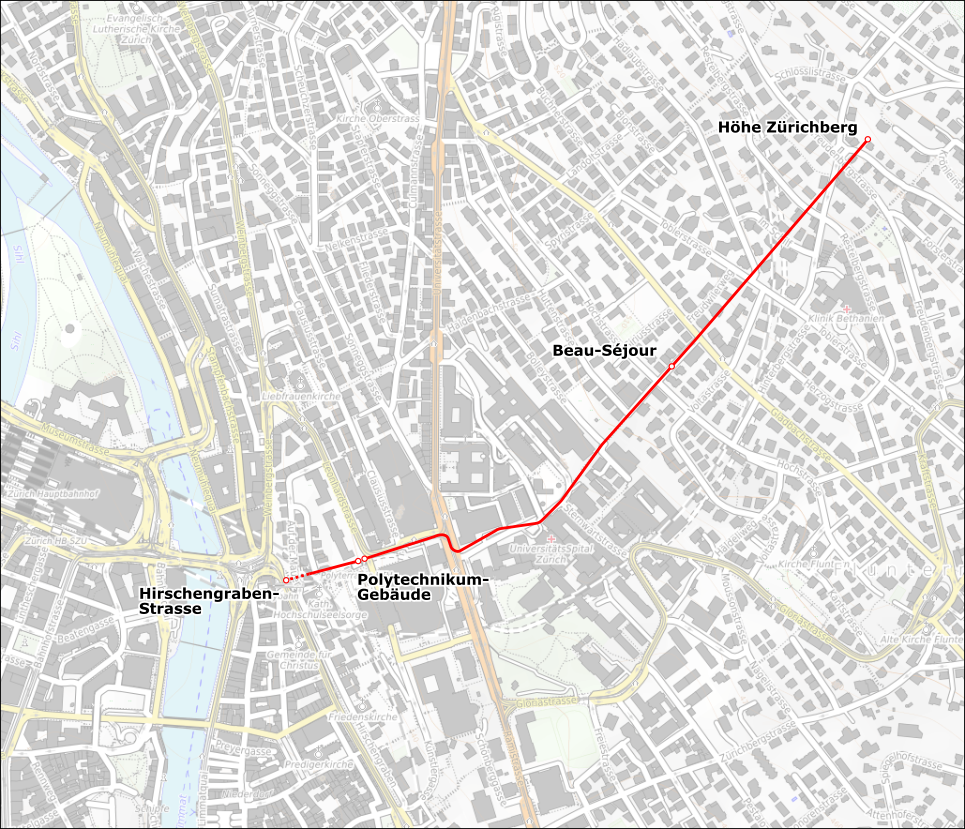 Lagekarte des Projektes der Rüge & Cie. zum Bau einer Zürichberg-Bahn dargestellt auf einem Kartenhintergrund von 2019.